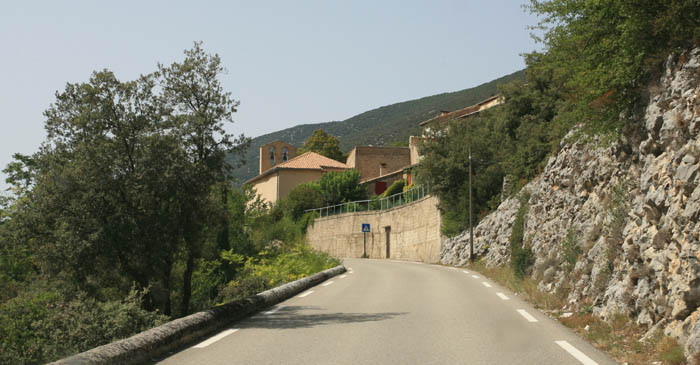 Arriving from east at the village of Saint léger du Ventoux - Vaucluse, France